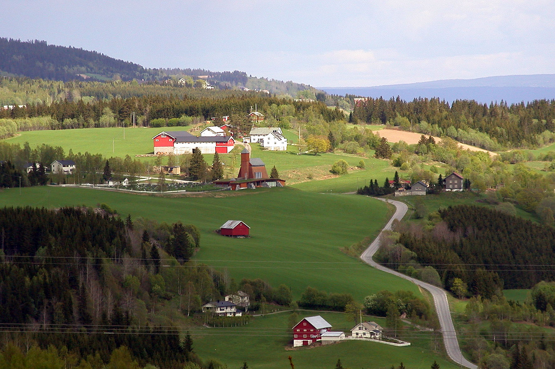 Ringsjøen, Snertingdal, Oppland